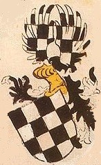 Ingeram-Codex der ehemaligen Bibliothek Cotta marschlk/ von/ oberdorff mansperg/[auf stauffenburg] thachenhussen von/wemlingen von/pffalheim von rechenberg